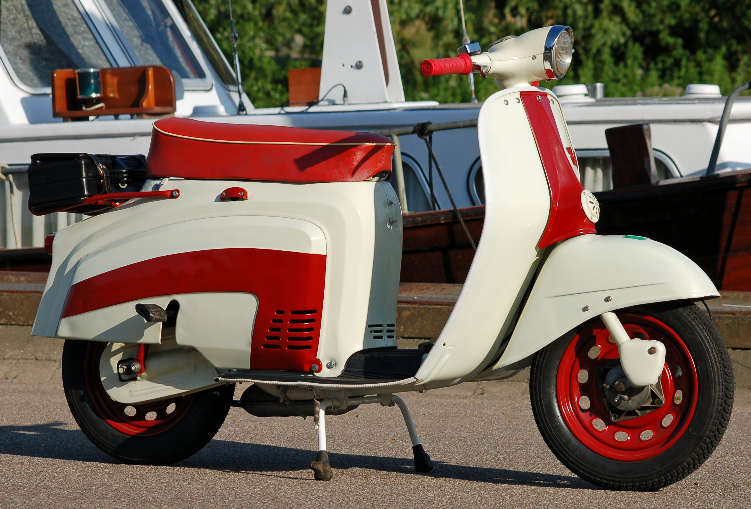 Garelli Capri Roller, Baujahr 1968